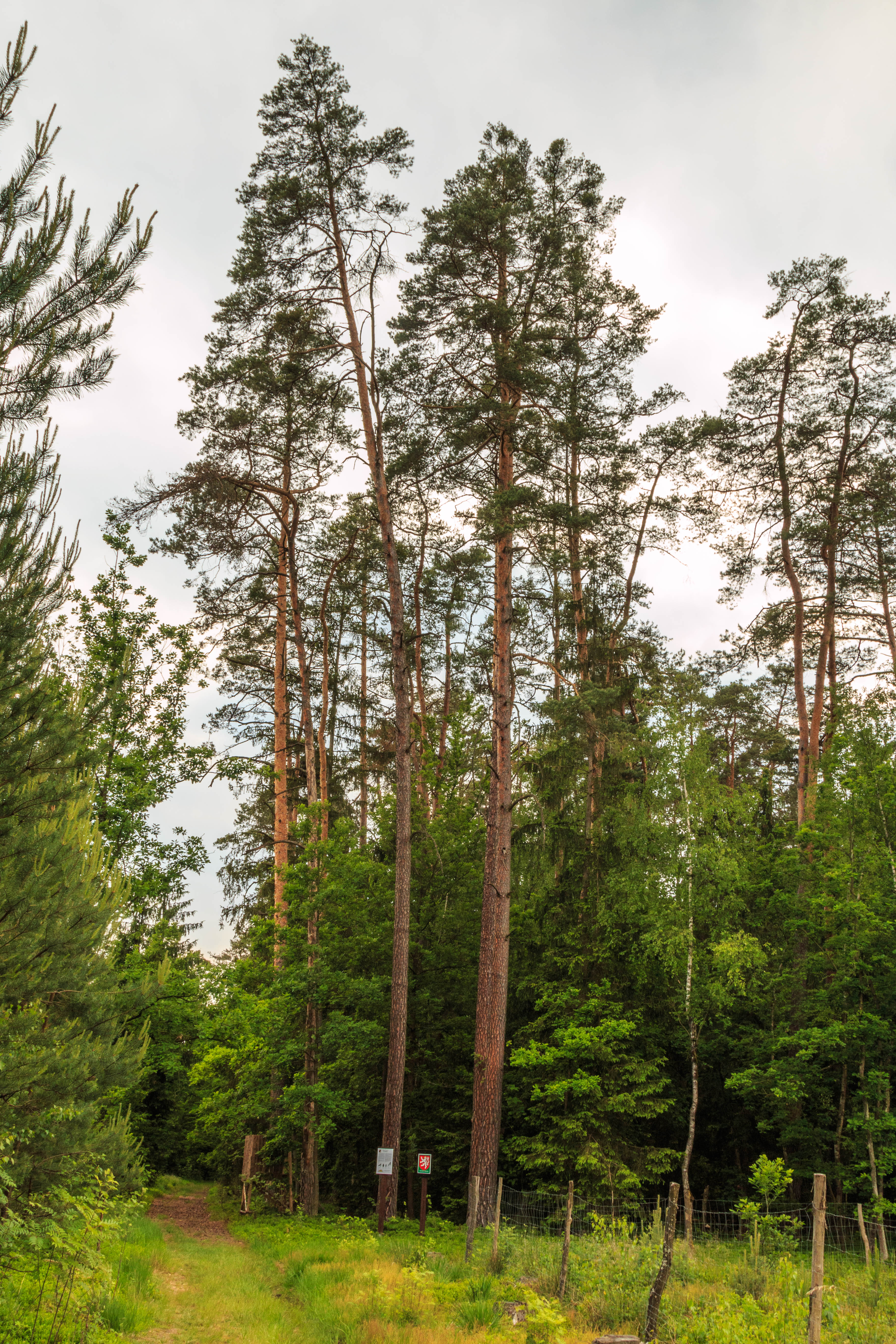 Přírodní památka U Glorietu Project: Chráněná území.